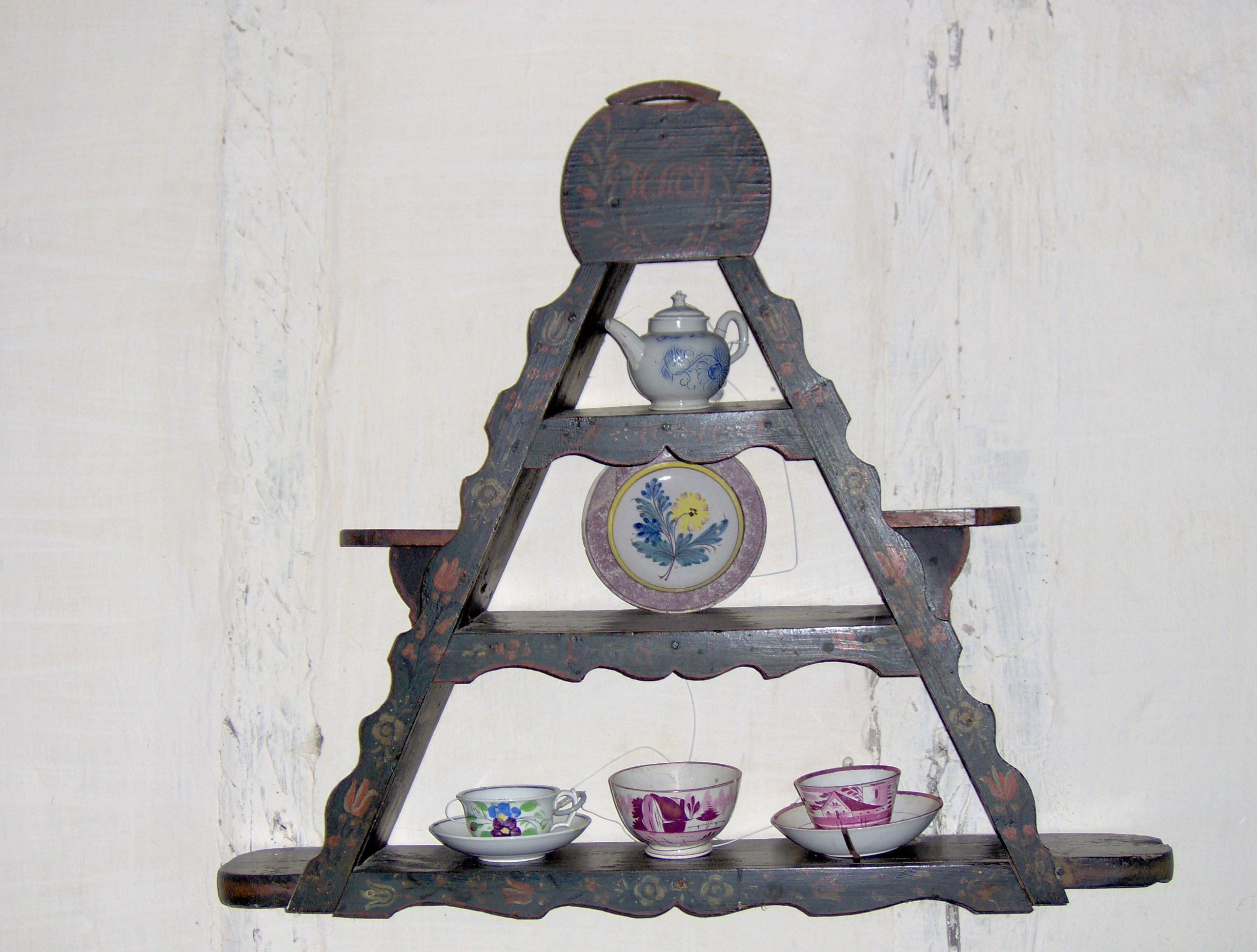 Fotograferet på Frilandsmuseet ved København